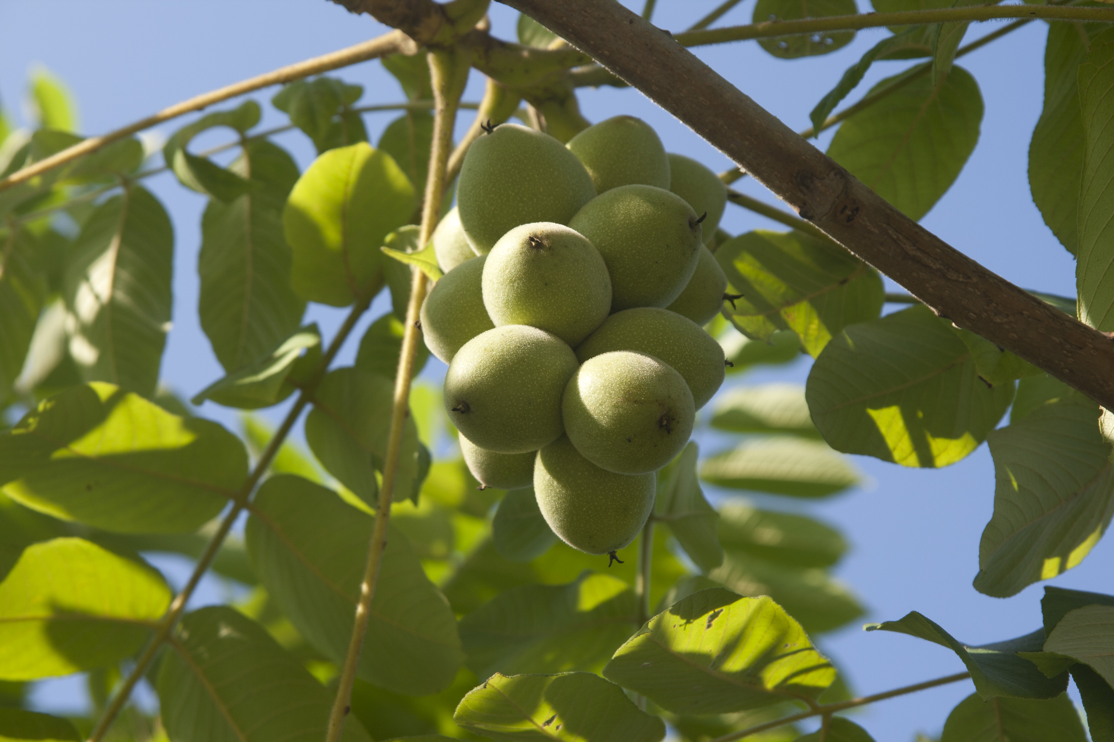 オニグルミ (学名:Juglans mandshurica var. sachalinensis)